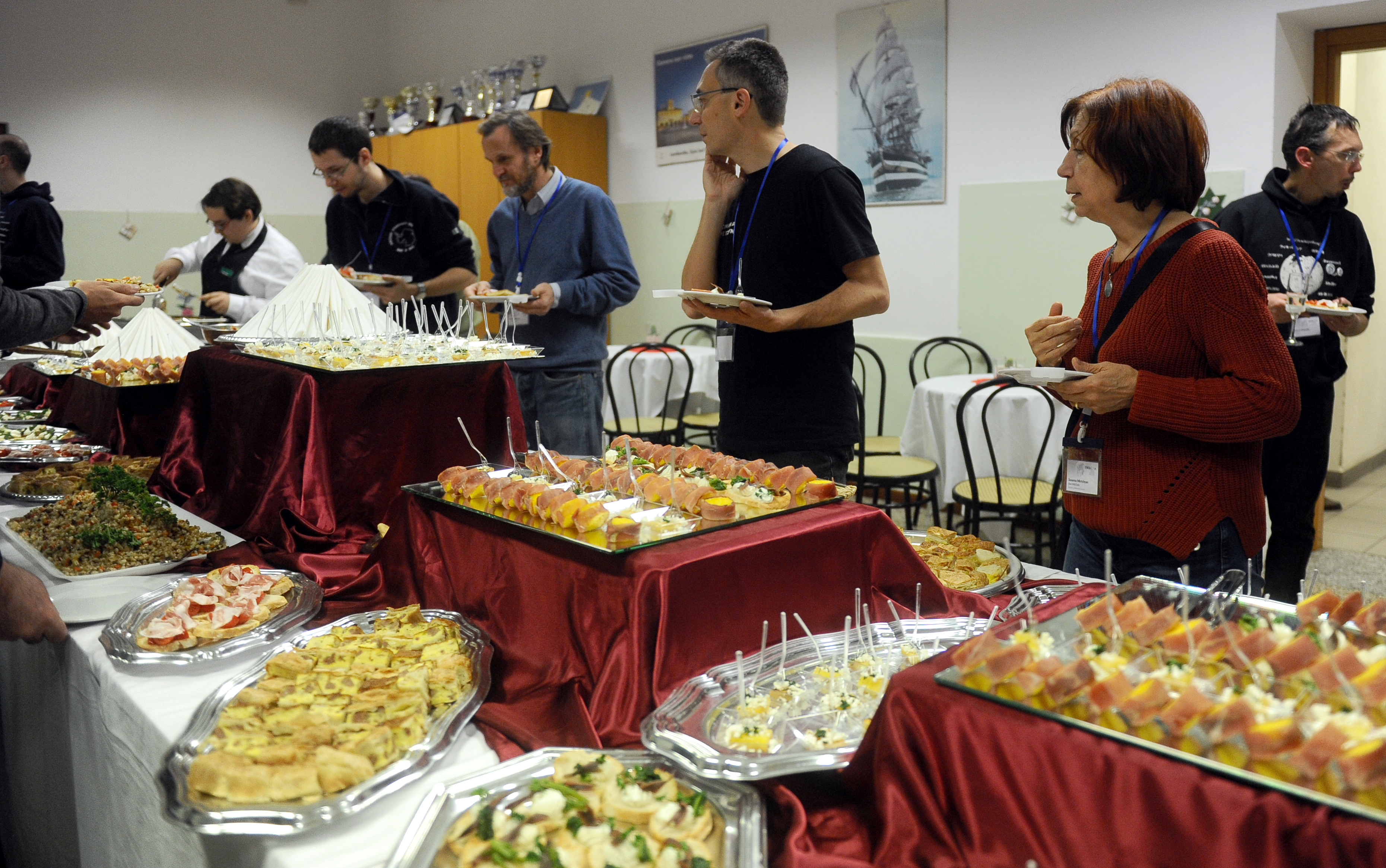 ItWikiCon 2018 - Apericena di benvenuto